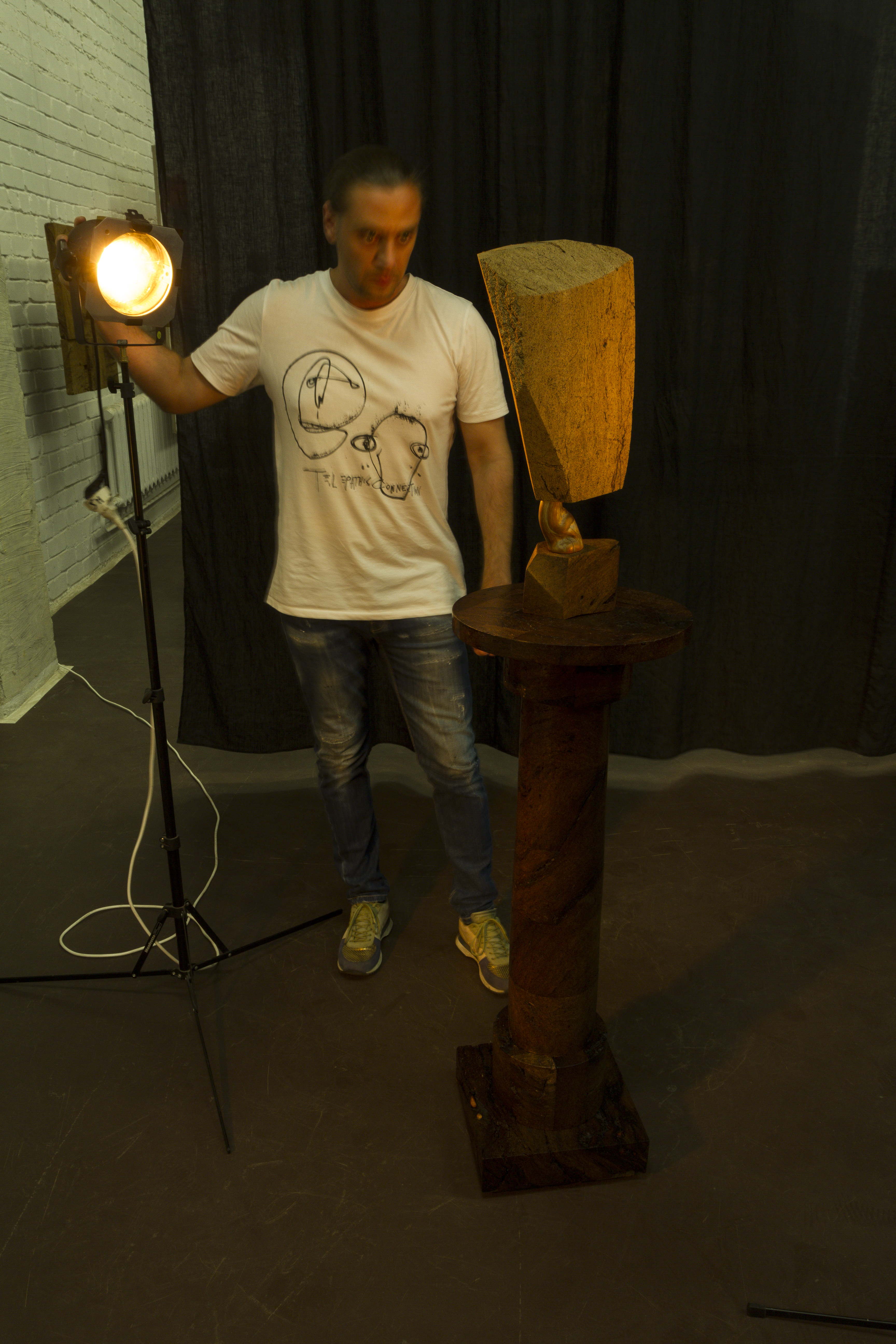 Visas autortiesibas saskaņotas